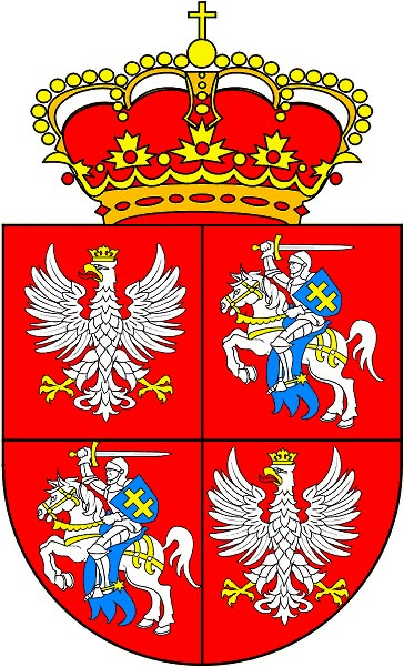 Herb Obojga Narodow